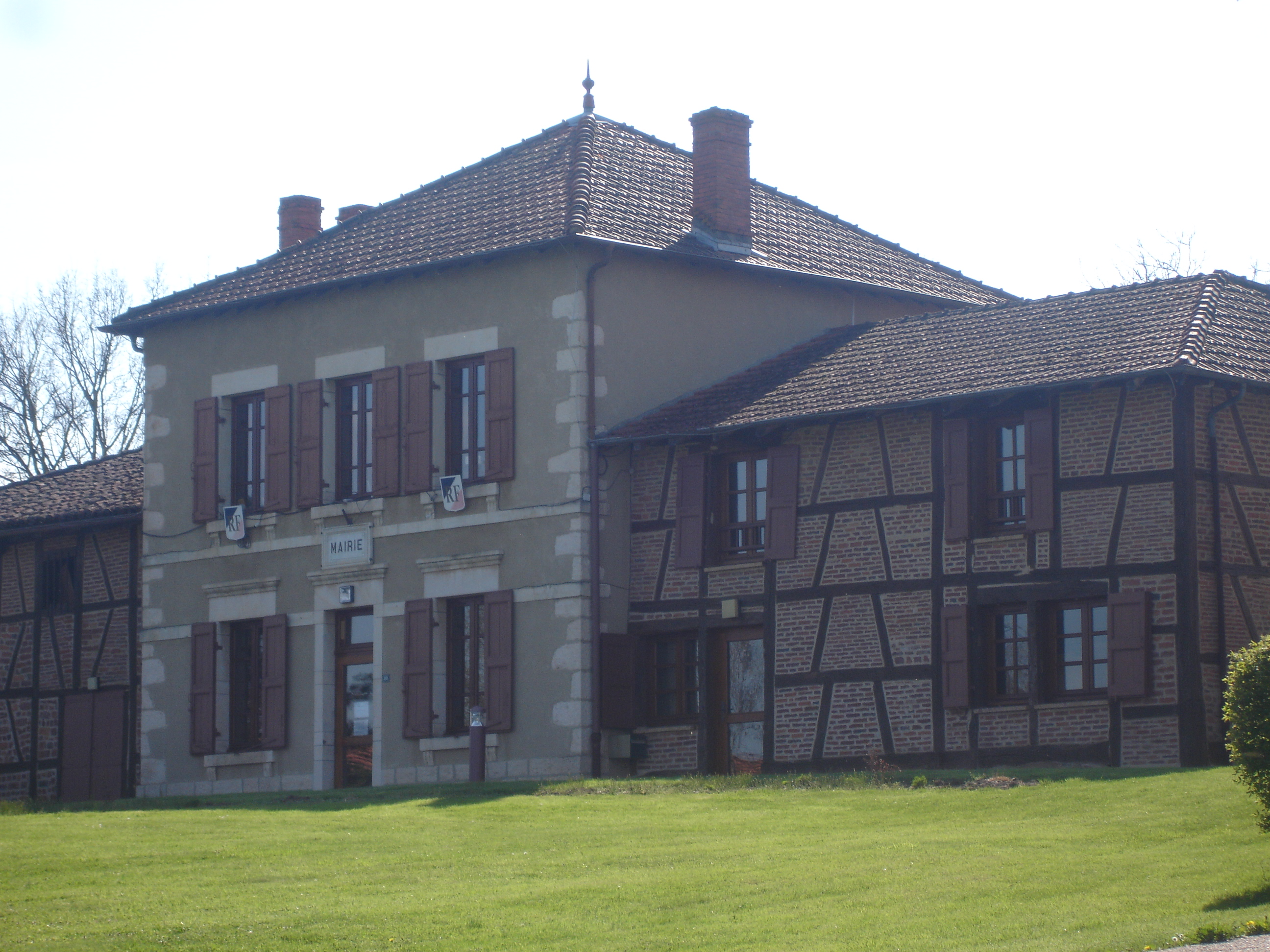 Jayat (Ain) : La mairie